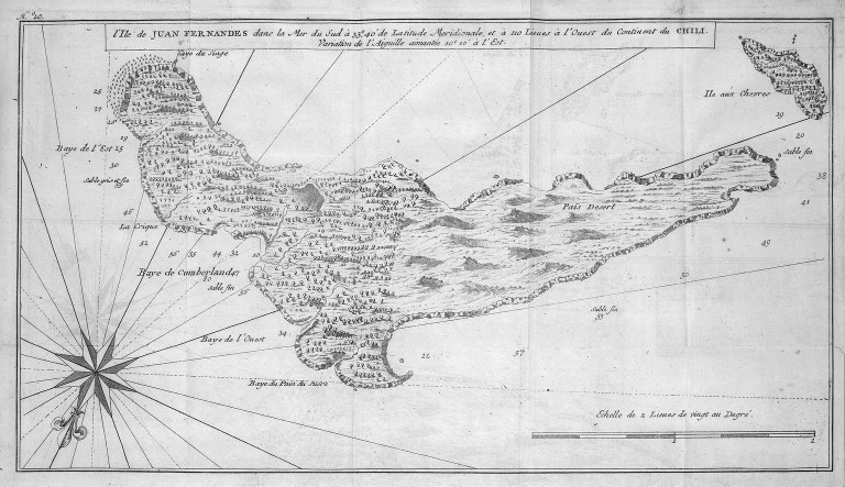 [Illustrations de Voyage autour du monde] Auteur : George Anson Éditeur : Henri-Albert Gosse et Compagnie (Genève) 1750